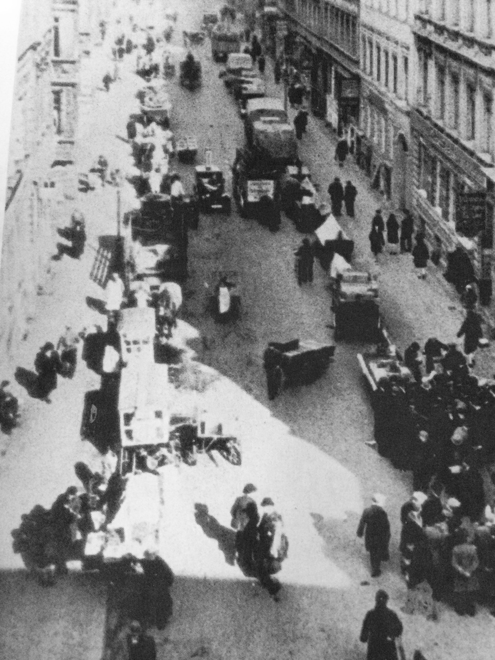 Grenadierstraße um 1930, mit Blick von der Münzstraße in Richtung Rosa-Luxemburg-Straße.